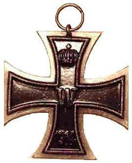 Foto van een onderscheiding in mijn eigen verzameling.